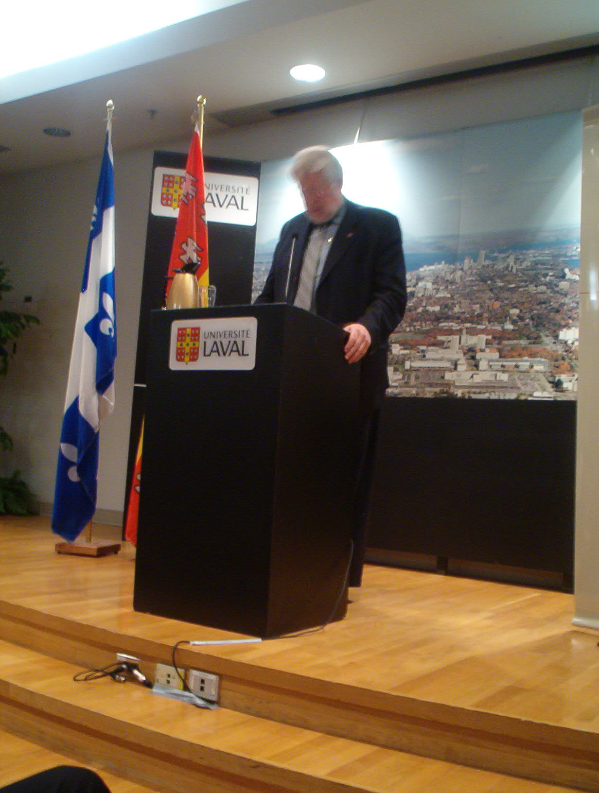 Allocution de clôture de la conférence, par M. Henri-François Gautrin, Ministre délégué au Gouvernement en ligne.